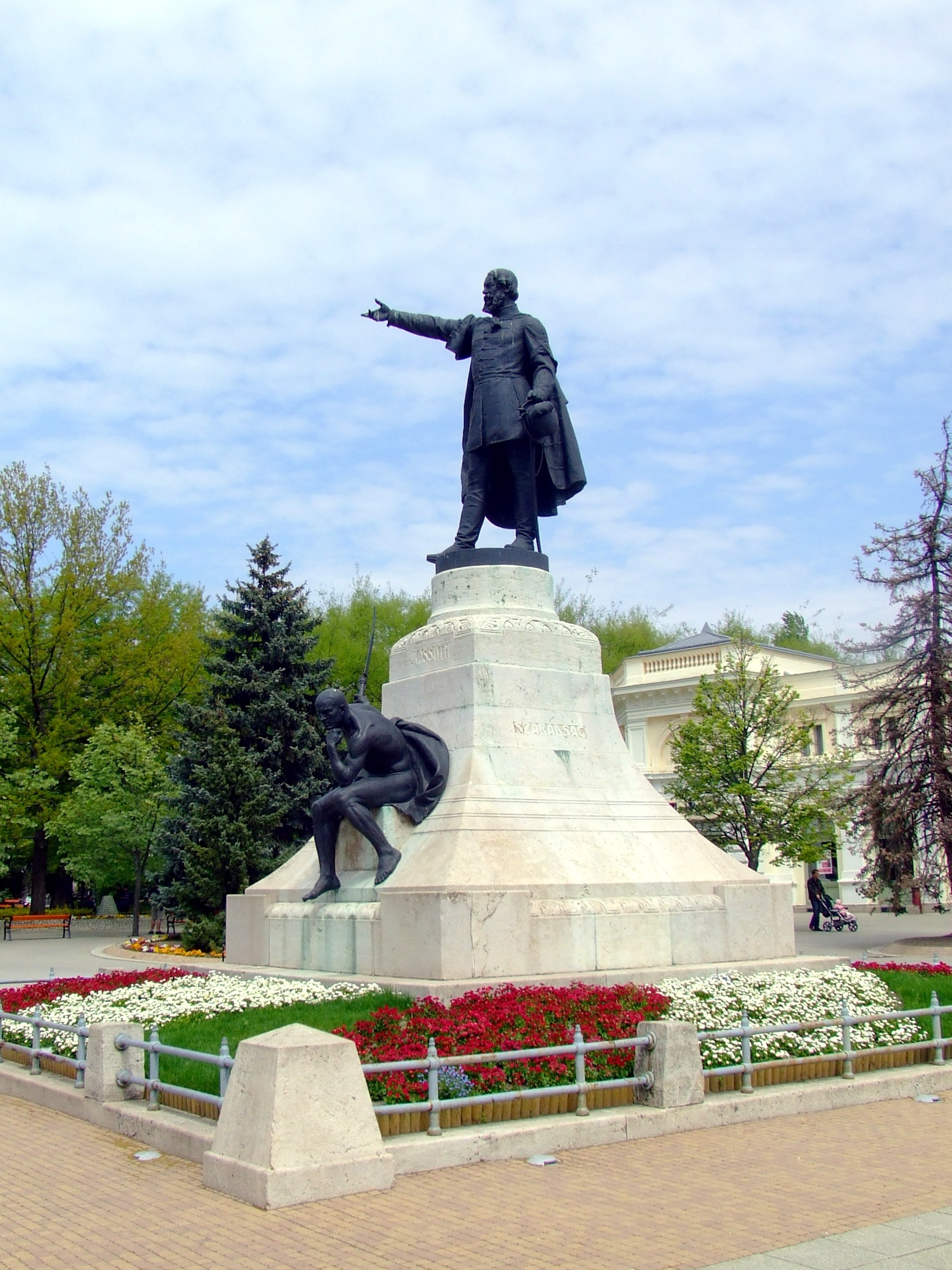 Kossuth Lajos szobra Kecskeméten. Telcs Ede szobrászművész alkotása (1906)